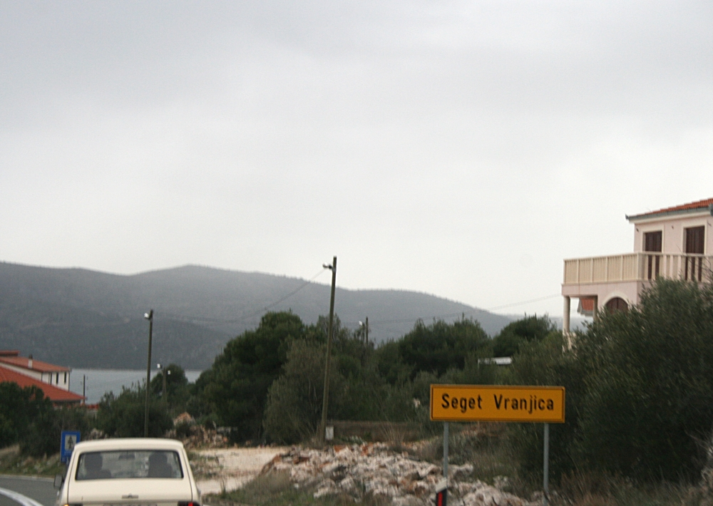 Split-Šibenik